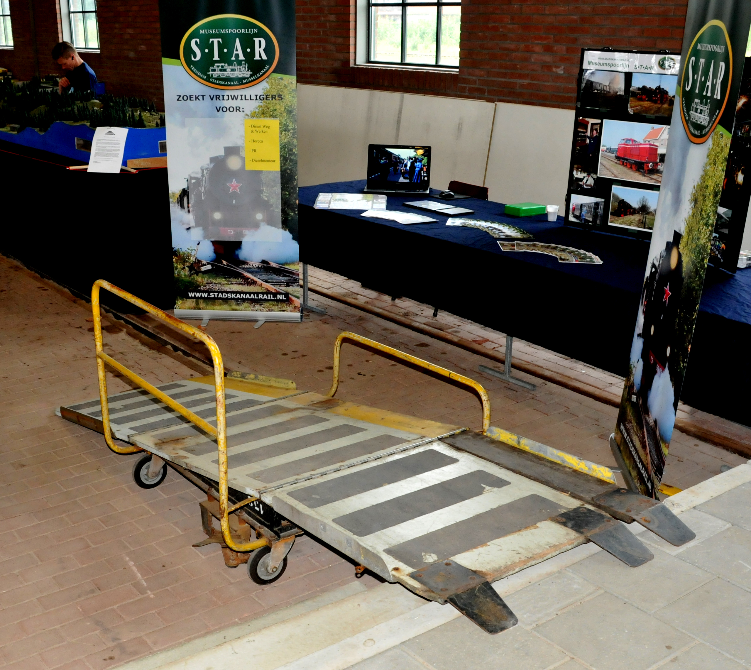 Rolstoelhelling op een Nederlands perron zoals in de jaren 1980 bij NS in gebruik. Hier bij de Stichting Stadskanaal Rail in de rijtuigloods/evenementenloods in gebruik.